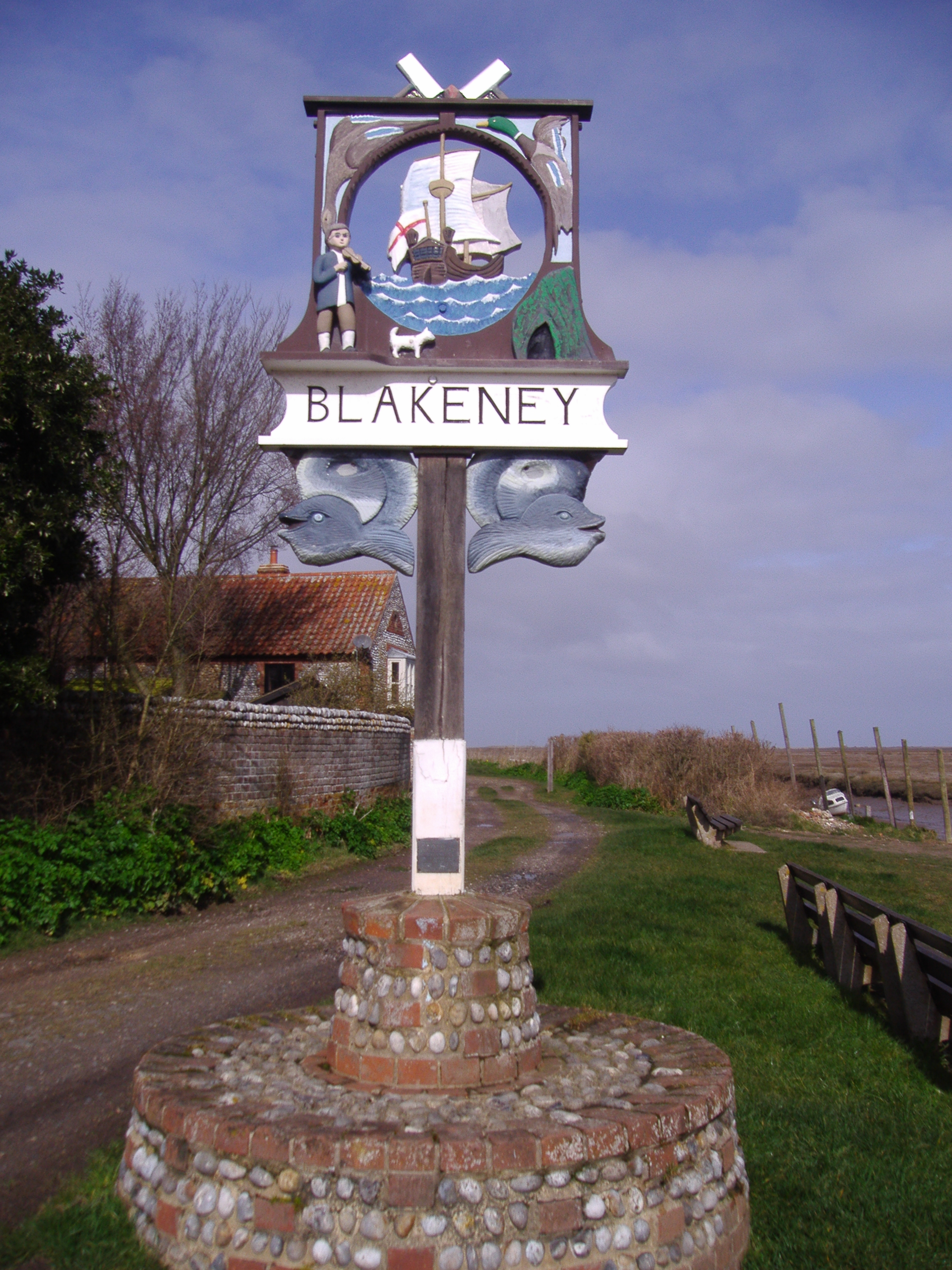 The Village sign, Blakeney, Norfolk